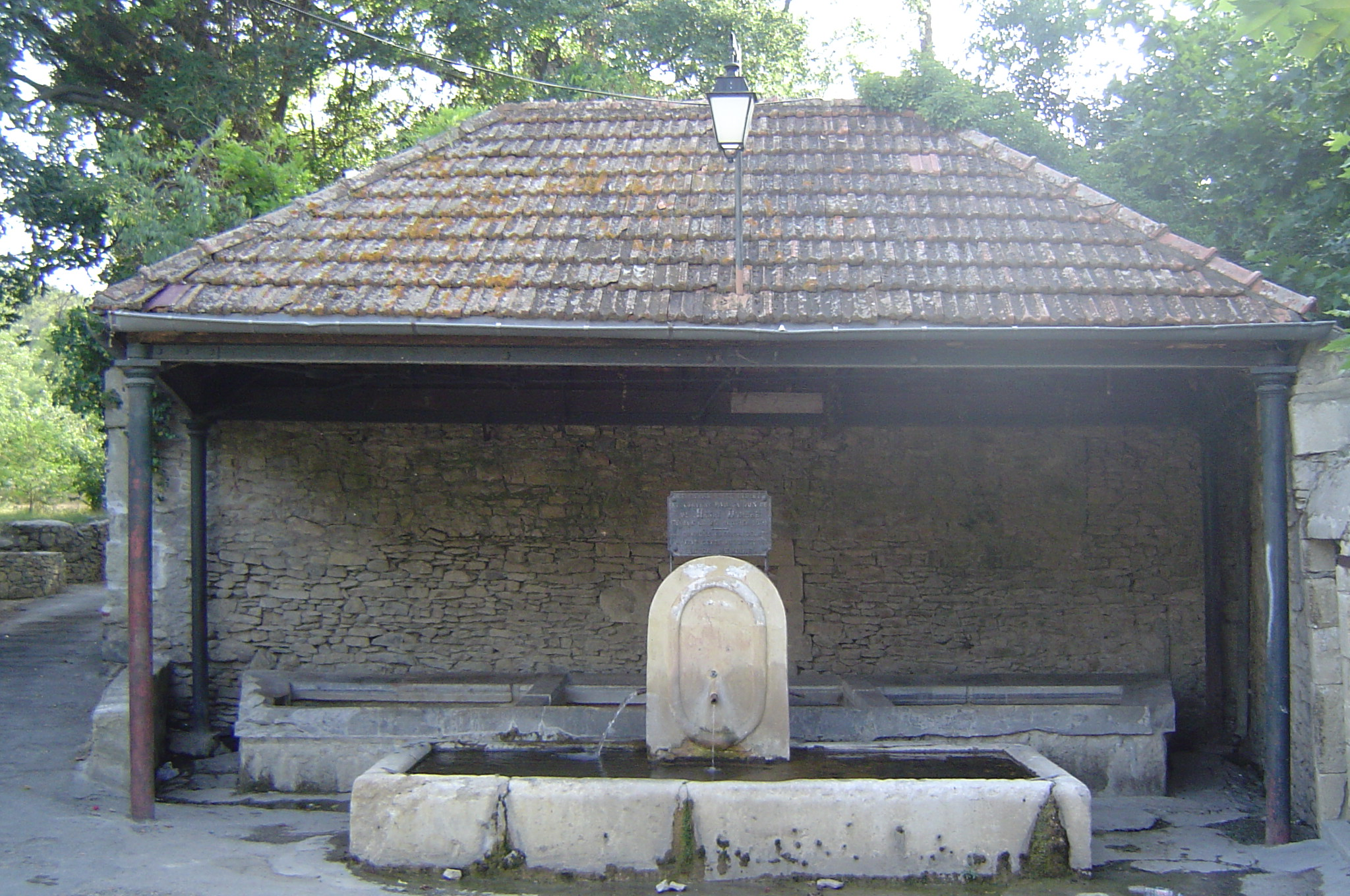 Lavoir de Langlade, photo personnelle de Nicolas Cadène, reproduction sur Wikipedia autorisée à l'identique.